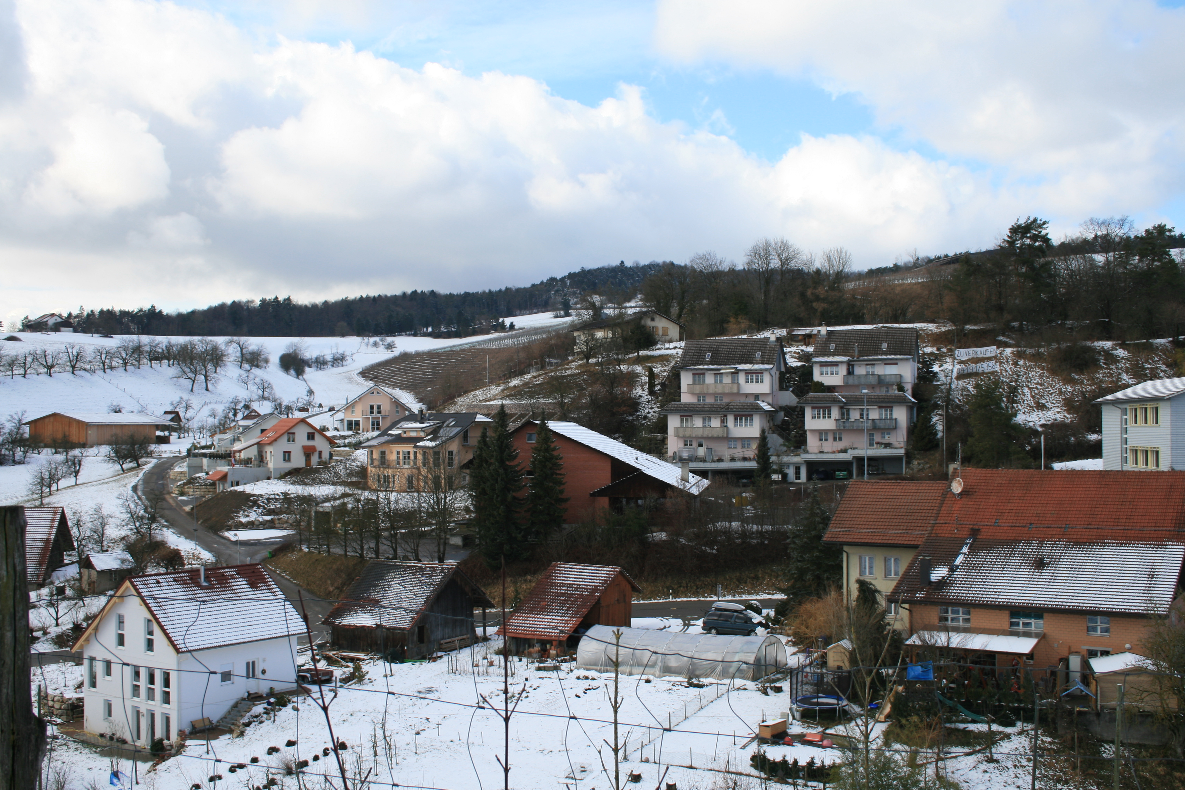 Elfingen AG, Schweiz